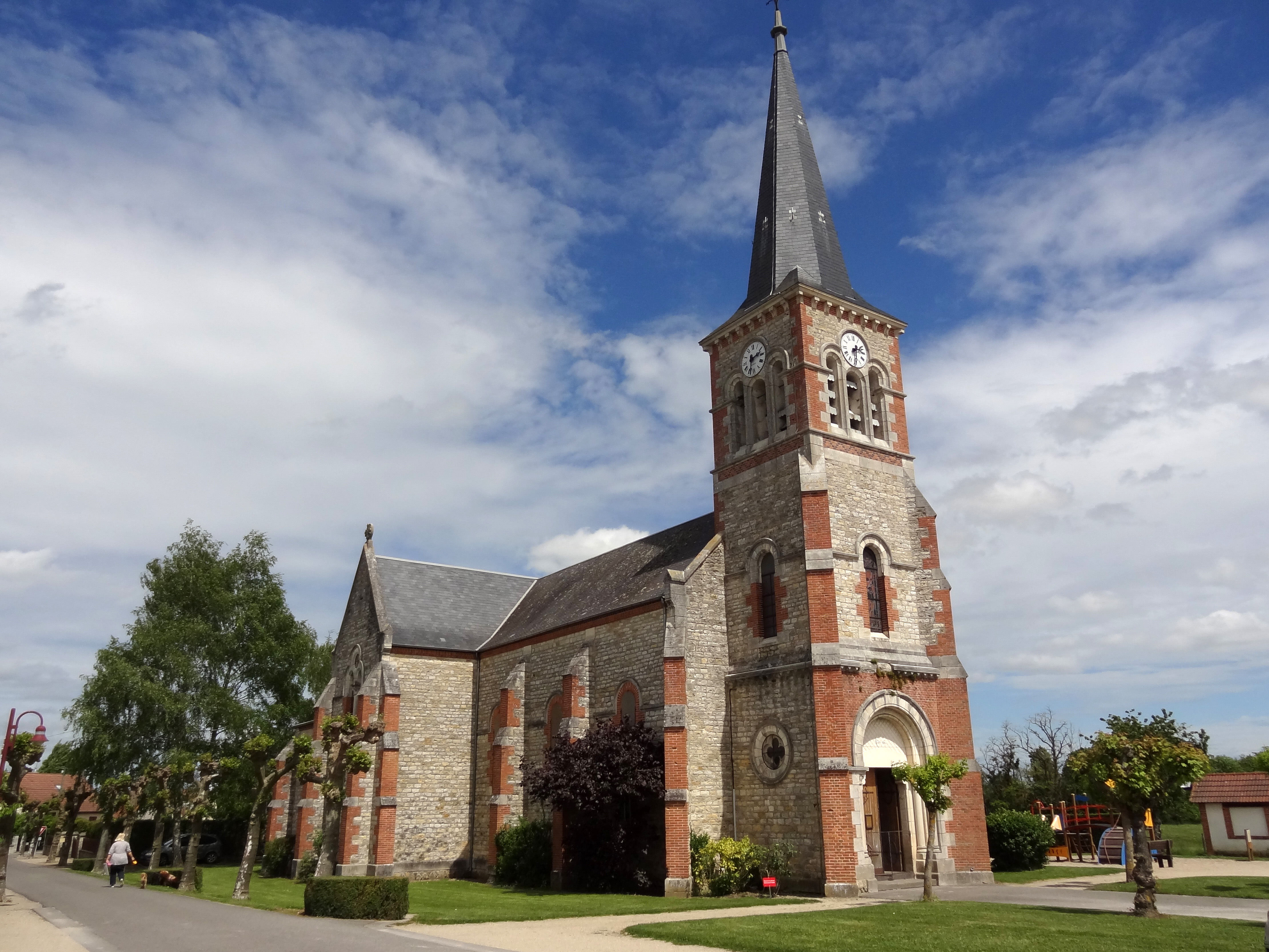 Eglise St Sebastien à Montbeugny